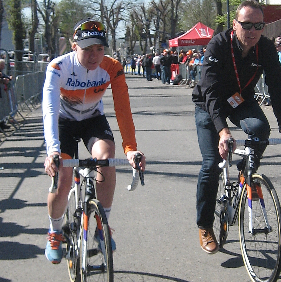 Winnares Anna van der Breggen (Rabo-Liv) met ploegleider Koos Moerenhout na finish Waalse Pijl 2016